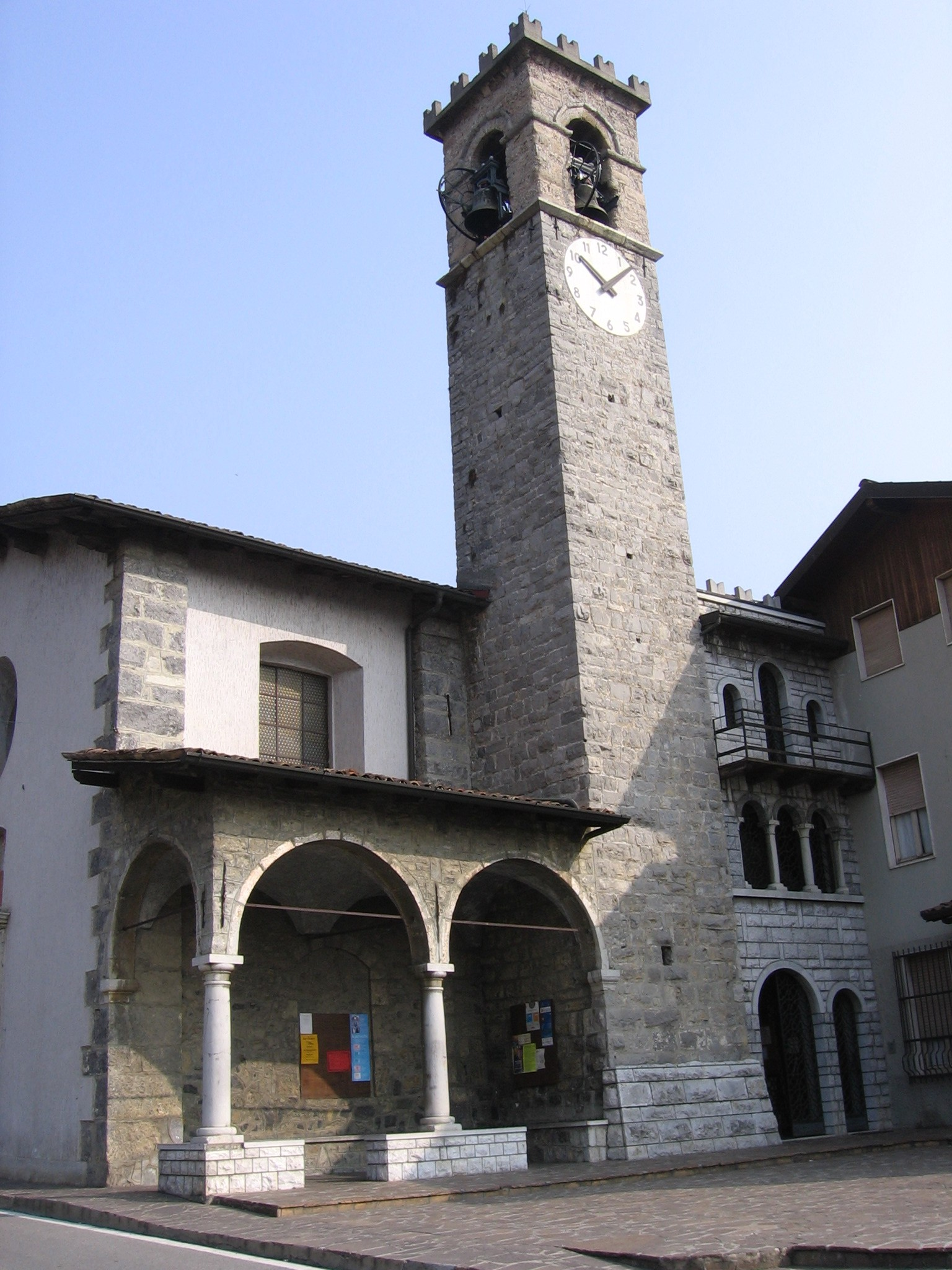 Chiesa parrocchiale di san Maurizio. Colzate, Bergamo, Italia